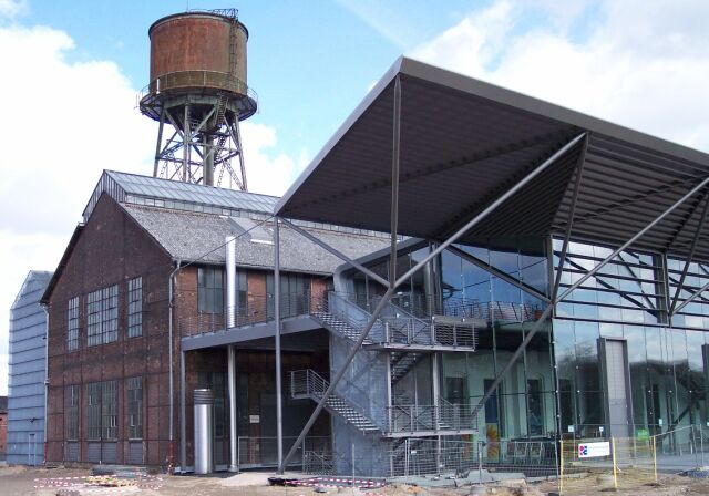 Bild aus Bochum